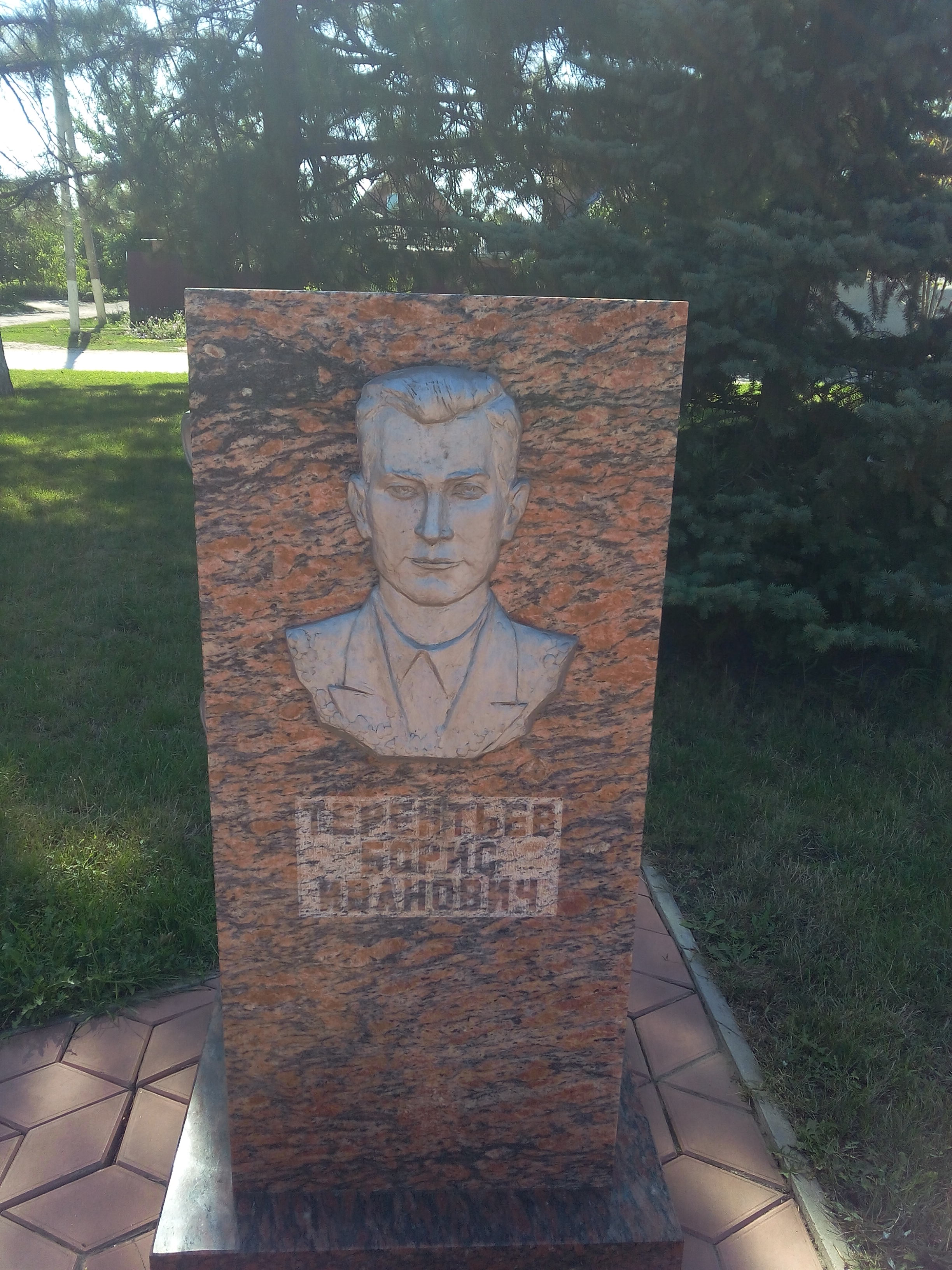 г. Сальск, пл. Свободы, памятная стела с барельефом Терентьева Б.И. на Аллее Героев